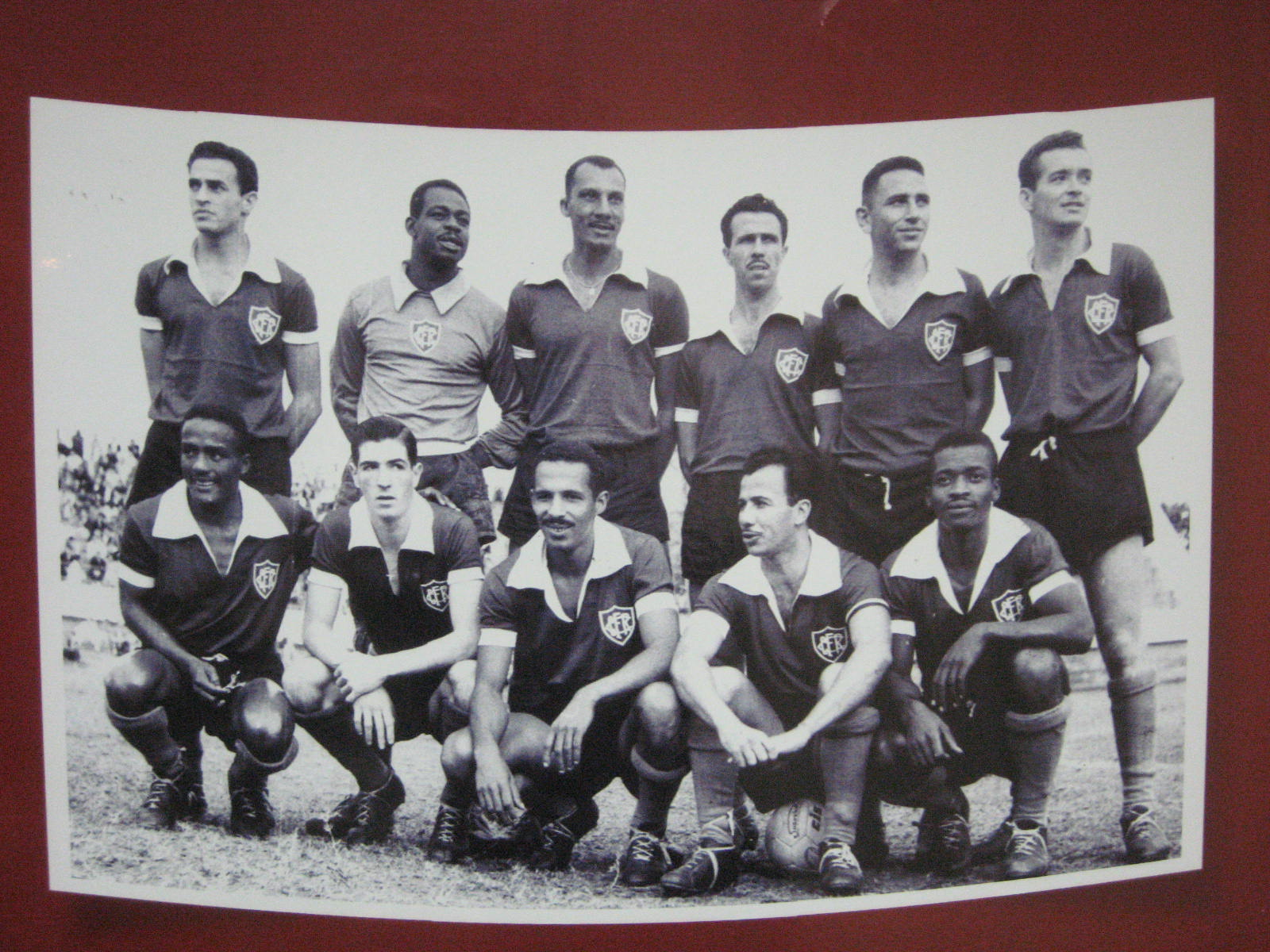 Formação do Canto do Rio em 1956.